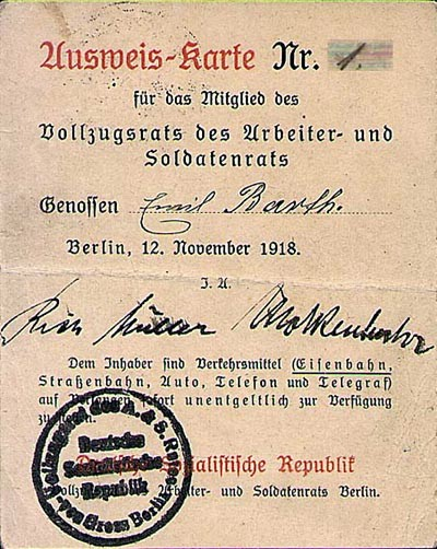 Ausweis von Emil Barth (Politiker), der ihn als Mitglied des Vollzugsrats der Arbeiter- und Soldatenräte deklariert. Unterschrieben durch Richard Müller und Brutus Molkenbuhr als Vorsitzende des Berliner Vollzugsrates.